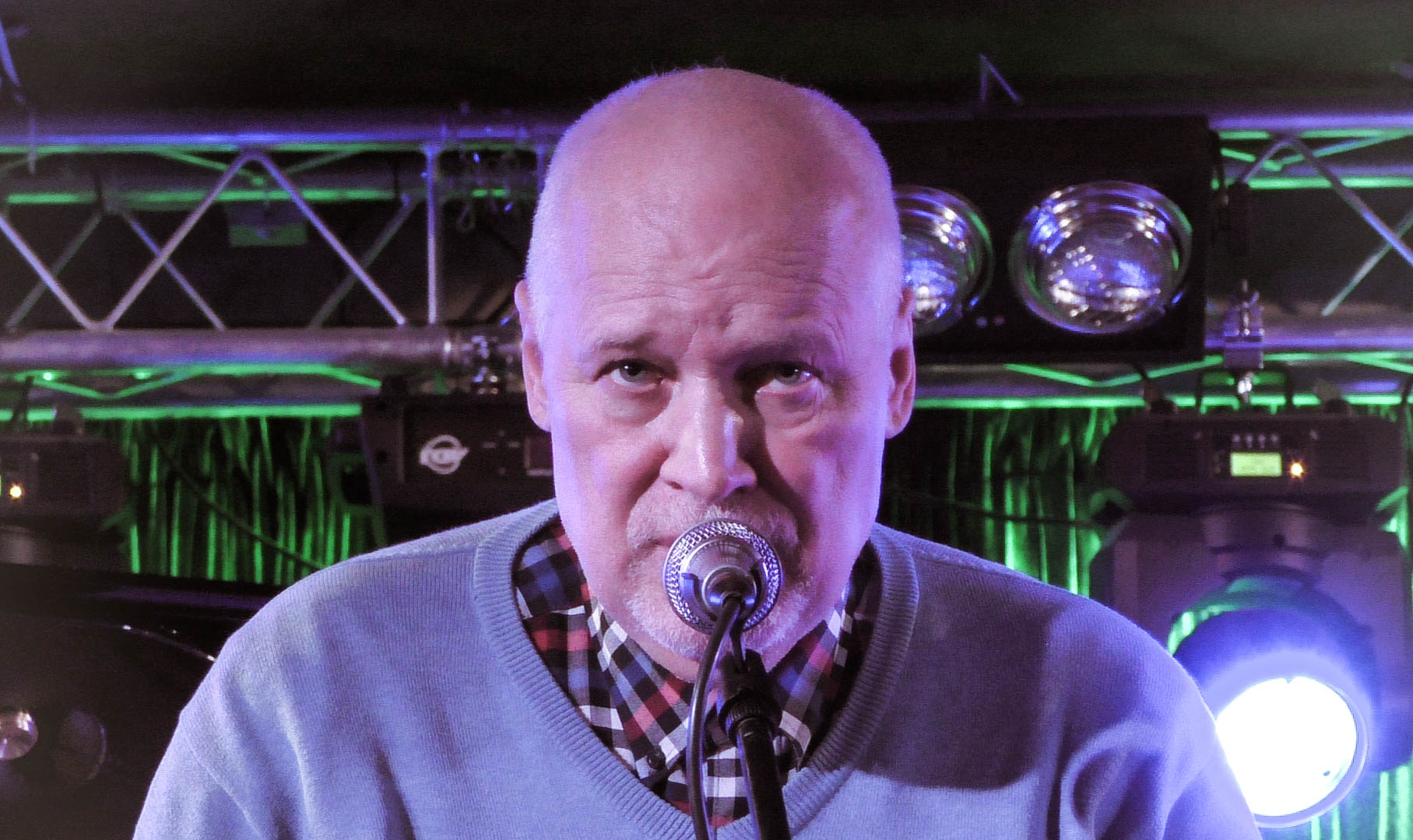 20.10.2017. Клуб Алексея Козлова. Творческая встреча с Тыну Найссоо.